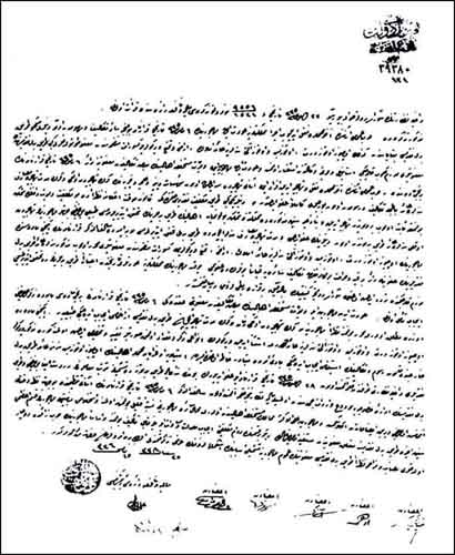 Фирман об освобождении армян от налогов